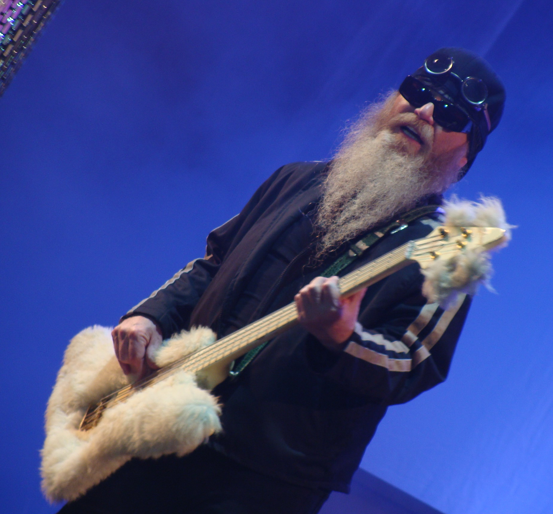 Dusty Hill, en un concierto de ZZ Top en el Bilbao BBK festival 2008.